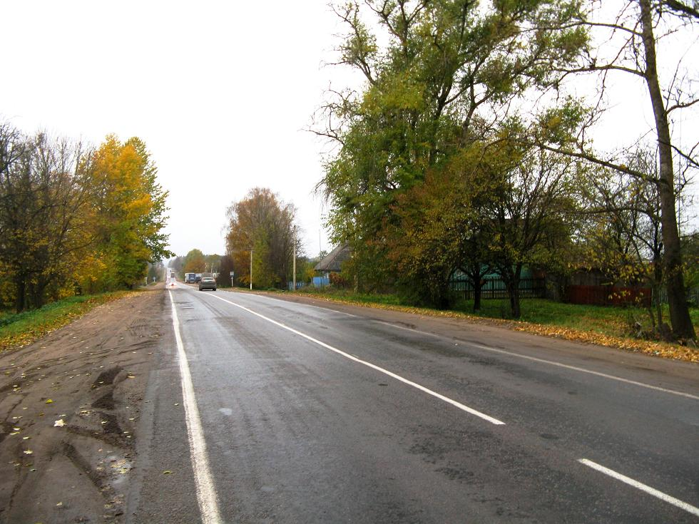 Трасса М-20 в Лудонях